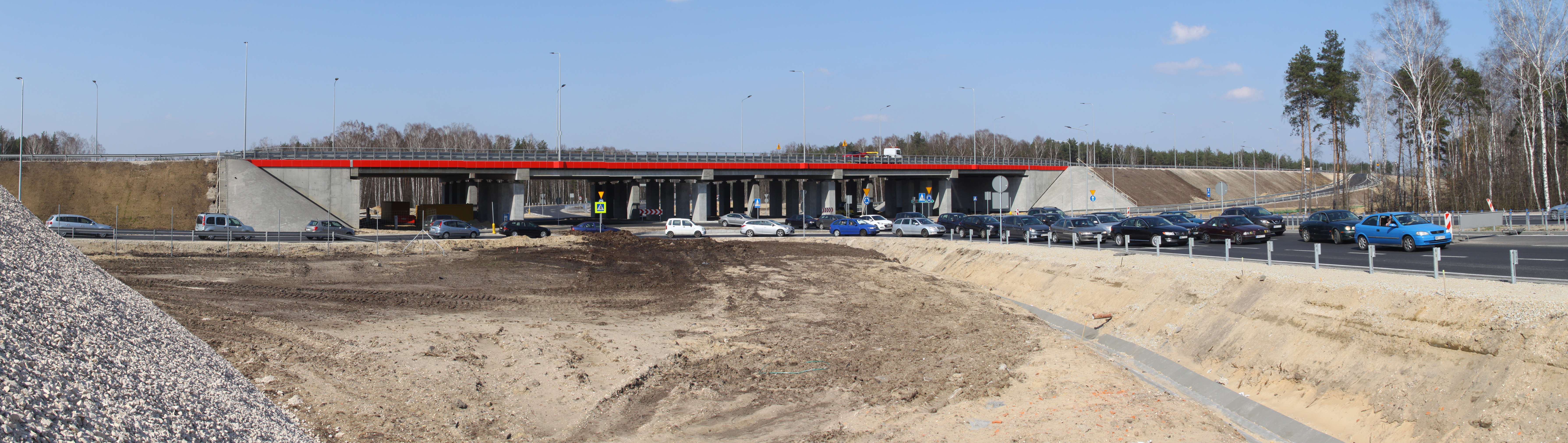 Węzeł Zielonka na Obwodnicy Marek, Polska